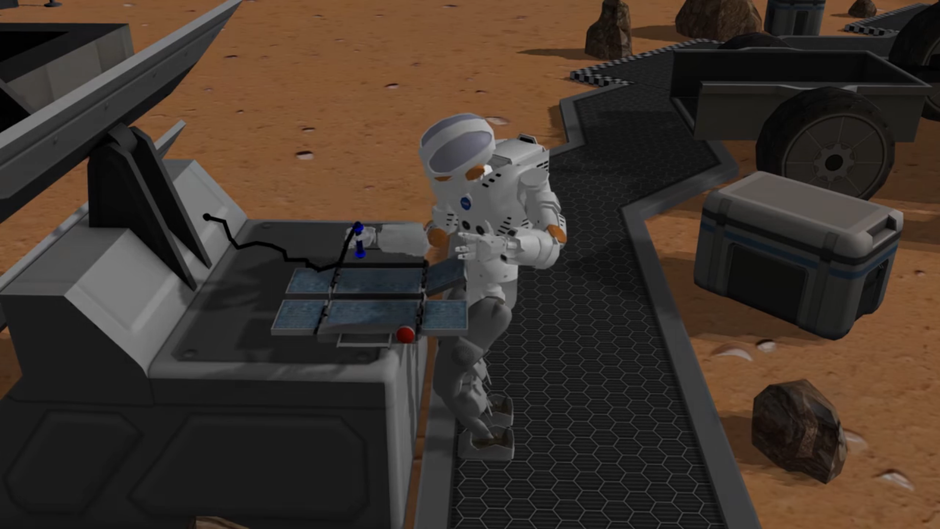 Valkyrie robot solving task 2 of NASA's Space Robotics Challenge on the Gazebo simulator